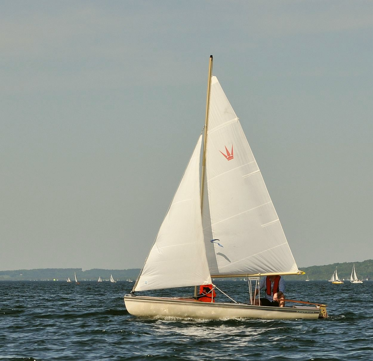 Segelboot Koralle am Starnberger See